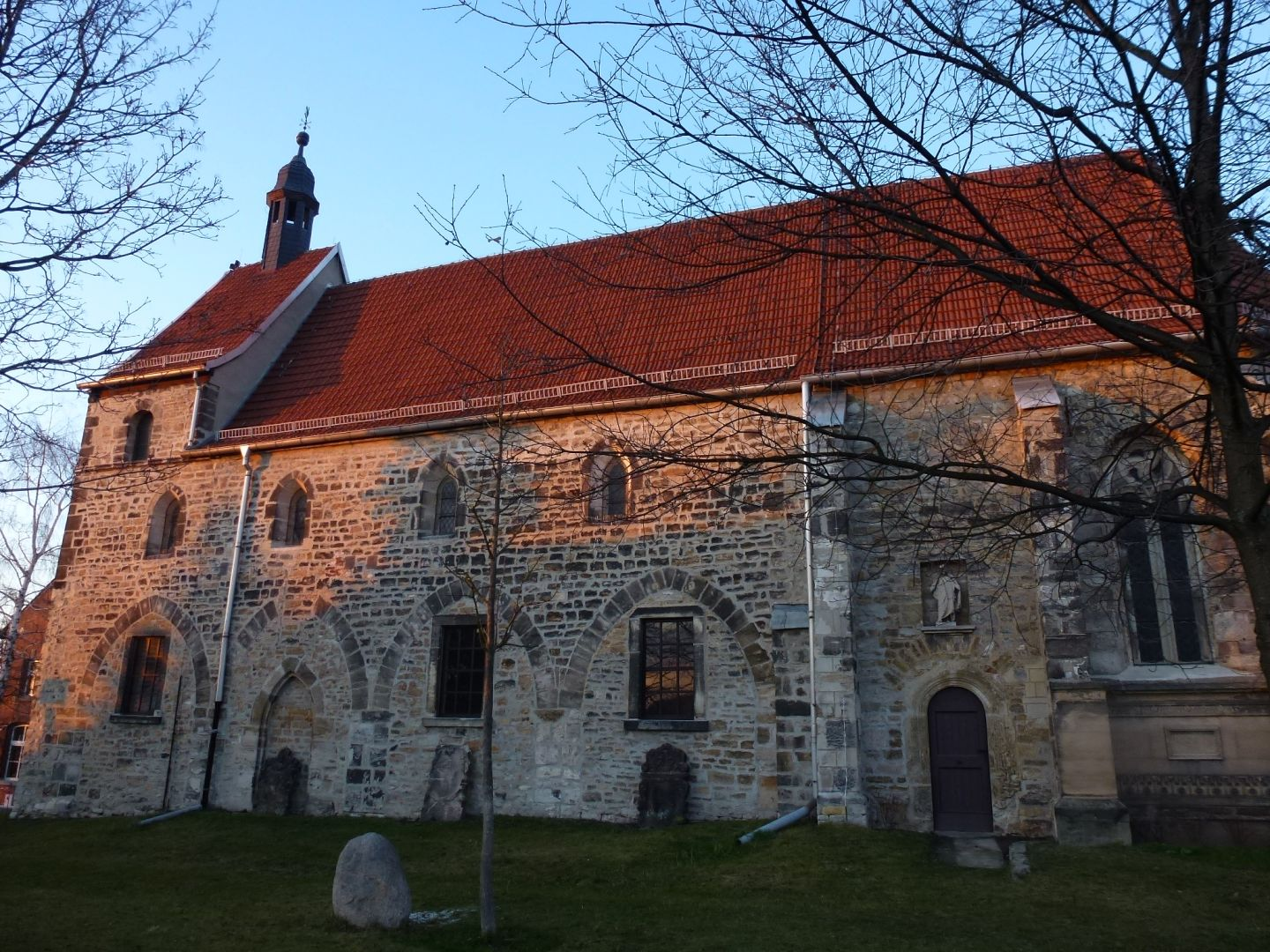 Kirche in Burgwerben